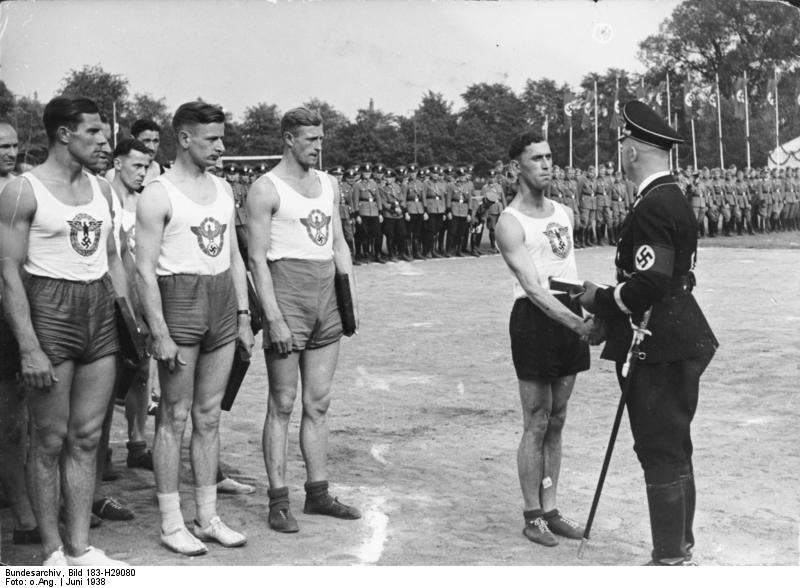 Lübeck, Himmler überreicht Sportpreis ADN-ZB-Archiv Leichtathletik-Polizeimeisterschaften, Juni 1938 in Lübeck. UBz: der Reichsführer der SS und Chef der deutschen Polizei, Heinrich Himmler, überreicht dem deutschen Polizeimeister im Hammerwerfen, Oberwachtmeister Lutz aus Dortmund, den Ehrenpreis. [Scherl Bilderdienst] Abgebildete Personen: Himmler, Heinrich: Reichsführer der SS, Deutschland (PND 11855123X)